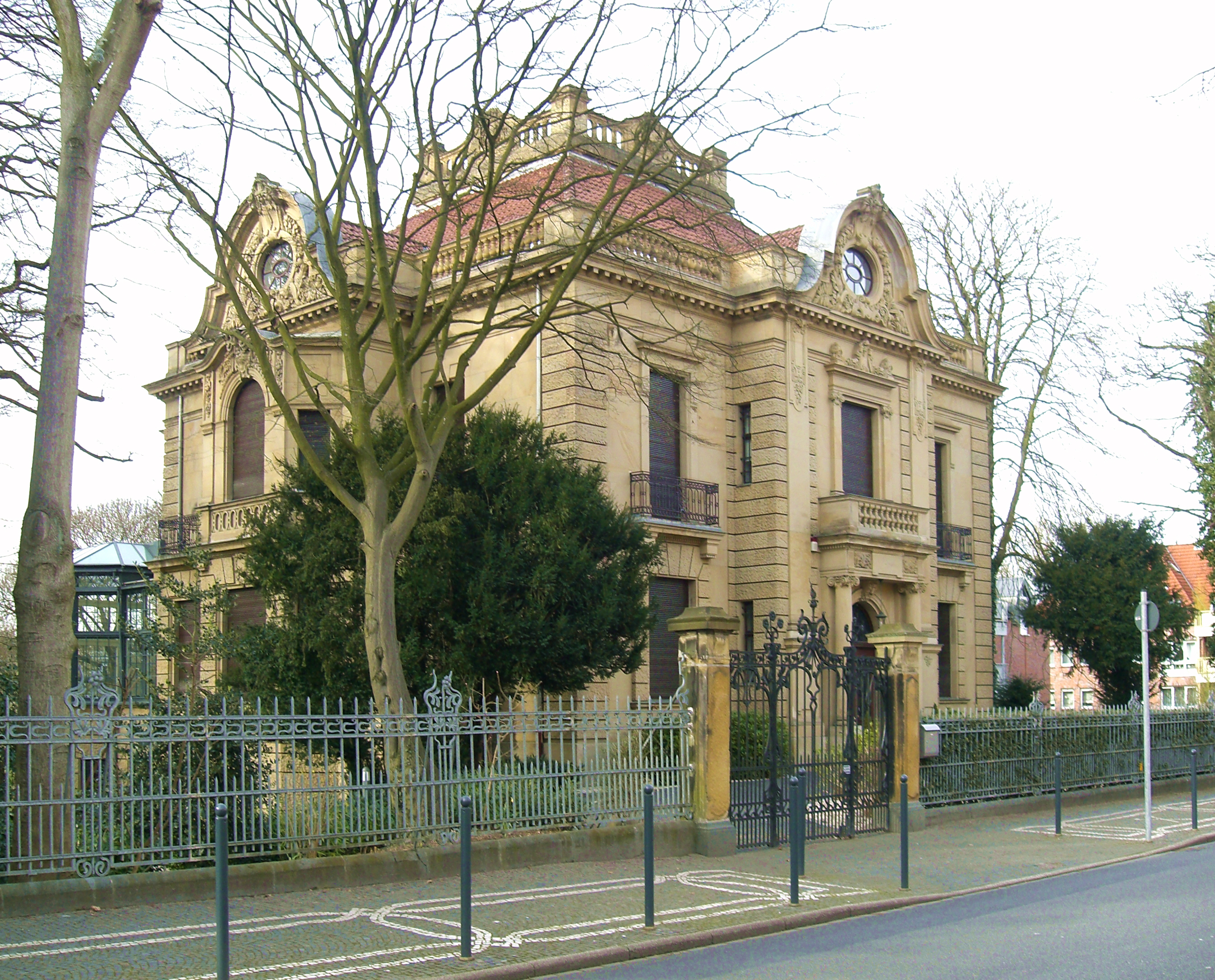 Villa Josef Thyssen This is a photograph of an architectural monument.